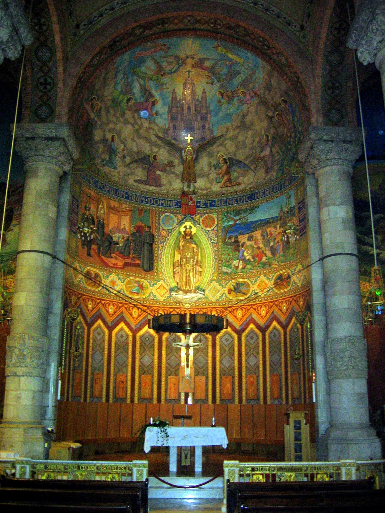 Templo Expiatorio del Sagrado Corazón, interior de la cripta